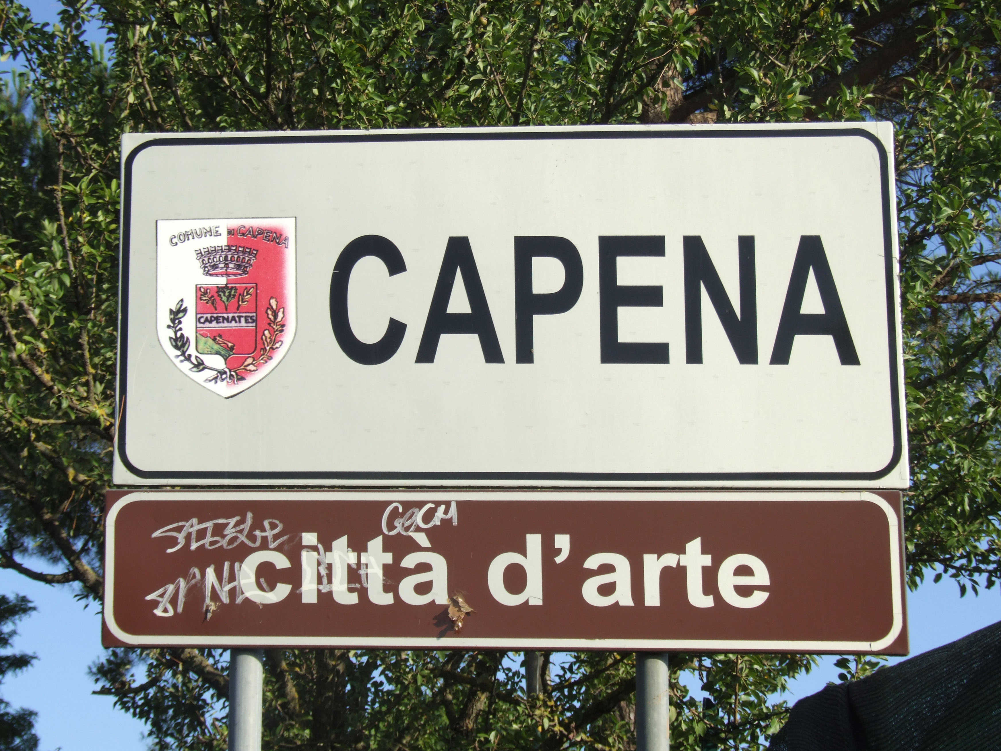 Segnale di Capena, Lazio, Italia